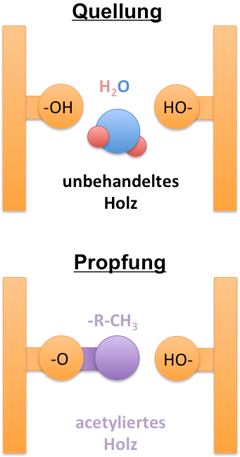 Funktionsprinzip der Acetylierung